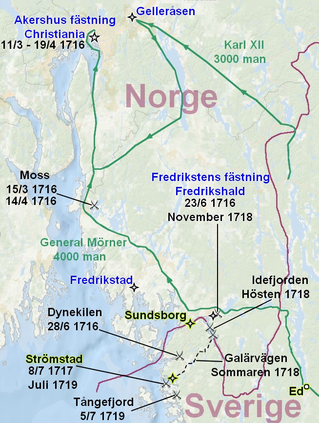 Karta över norra Bohuslän och södra Norge. Krigshändelser i samband med Karl XII:s anfall mot Norge 1716 (grönt), och 1718. Dessutom de dansk-norska motanfallen 1717 och 1719.